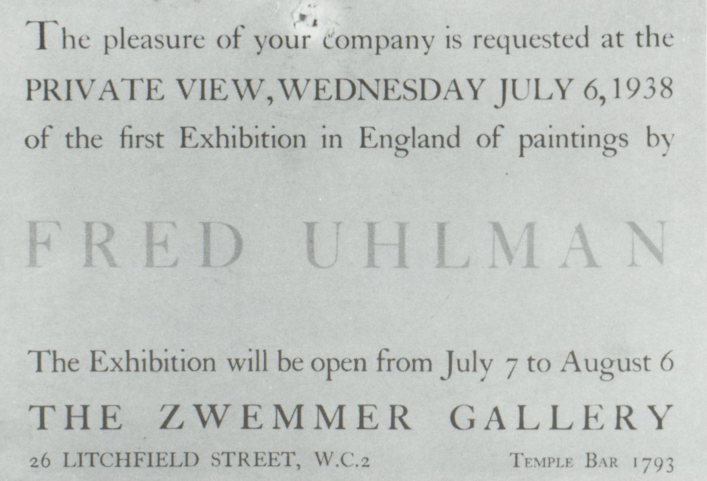 Zwemmer Gallery Fred Uhlman's first exhibition in England 1938